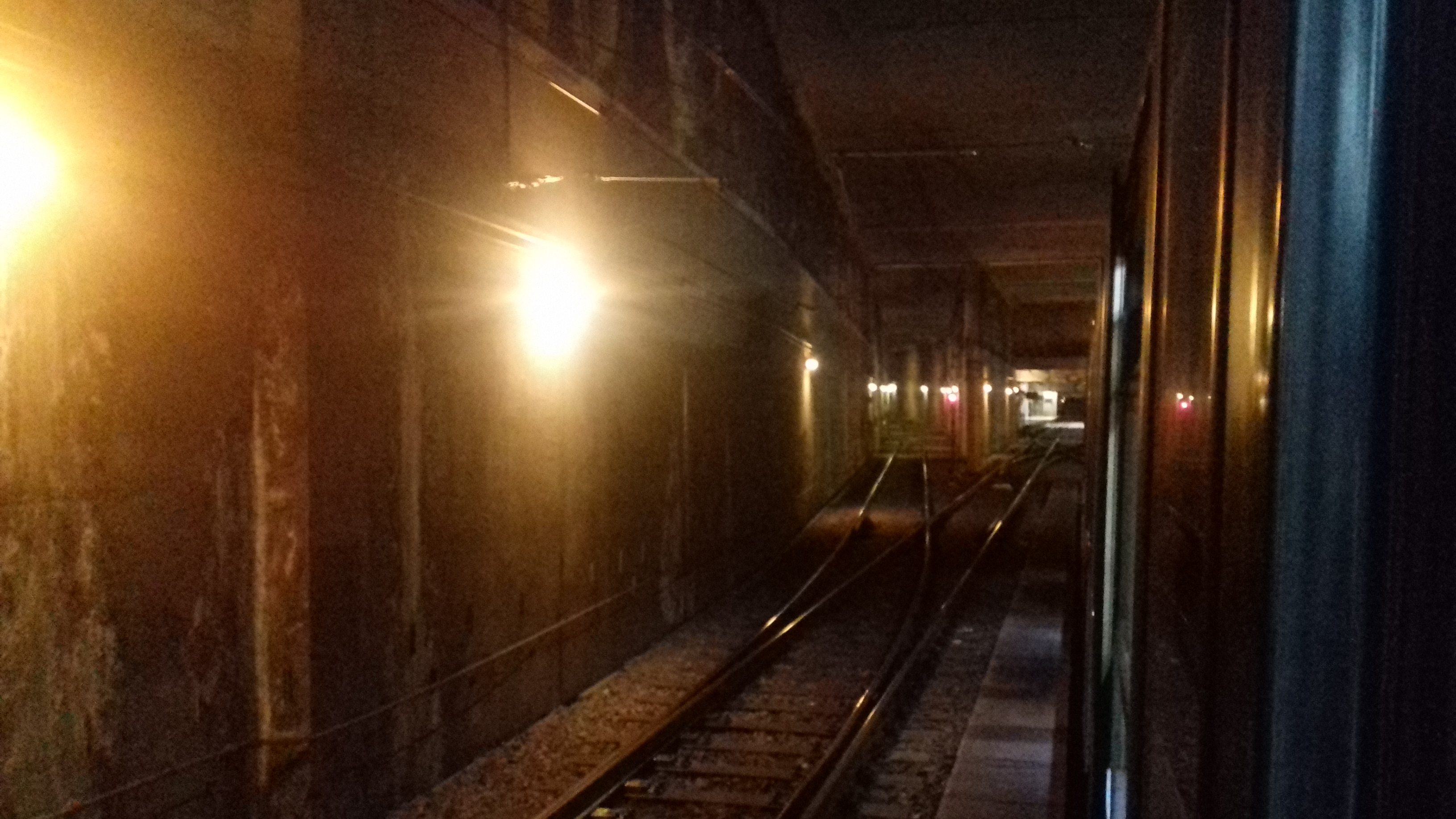 Via de enlace de linea 2 con linea 1